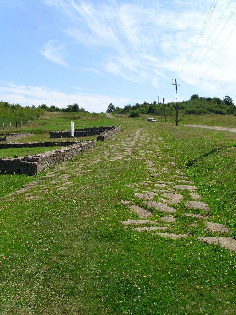 Porolissum Drumul Roman